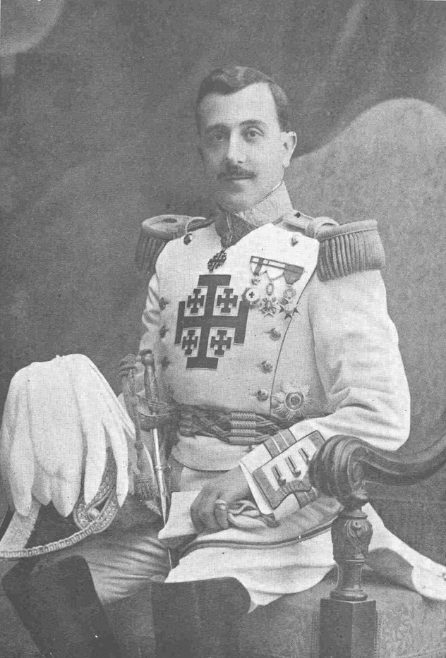 El marqués de Guerra, Vizconde de Arteaga, por Kaulak.